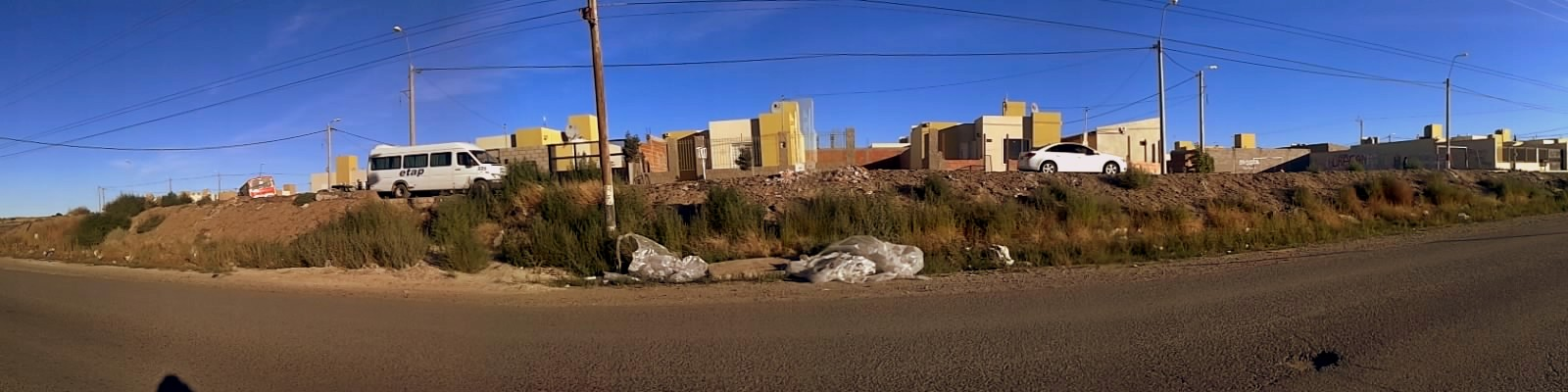 Restos del terraplén que conducía al empalme Astra